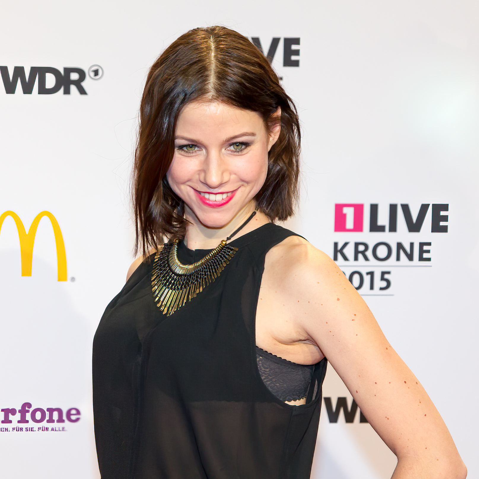 1LIVE Krone 2015 - Katrin Heß